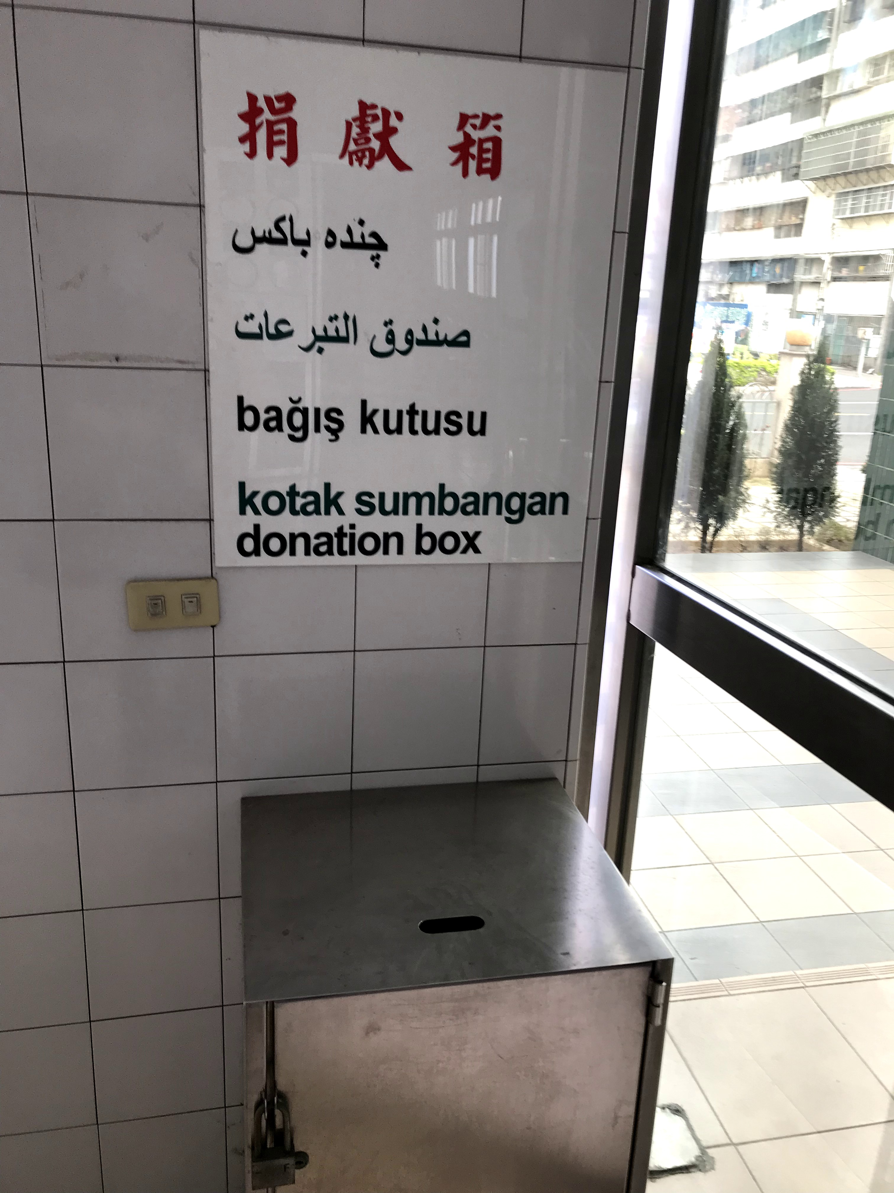 位於高雄市清真寺內的捐獻箱。捐獻箱上方的牌子，有中文、阿拉伯文、波斯文、土耳其文、印尼文（馬來文），以及英文敘述